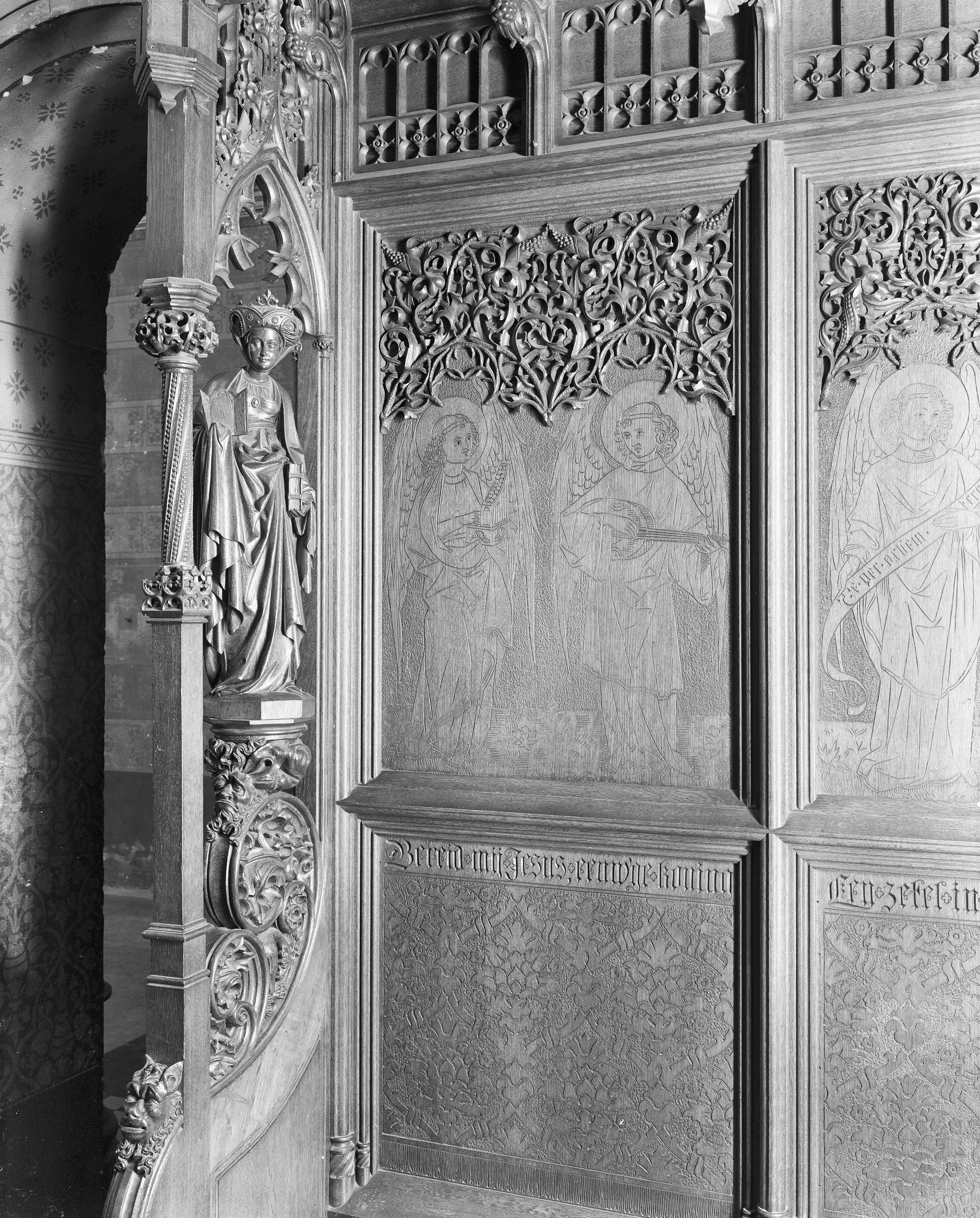 Rooms-Katholieke Sint Willibrordus Kerk: sedilia, paneel en zijwang